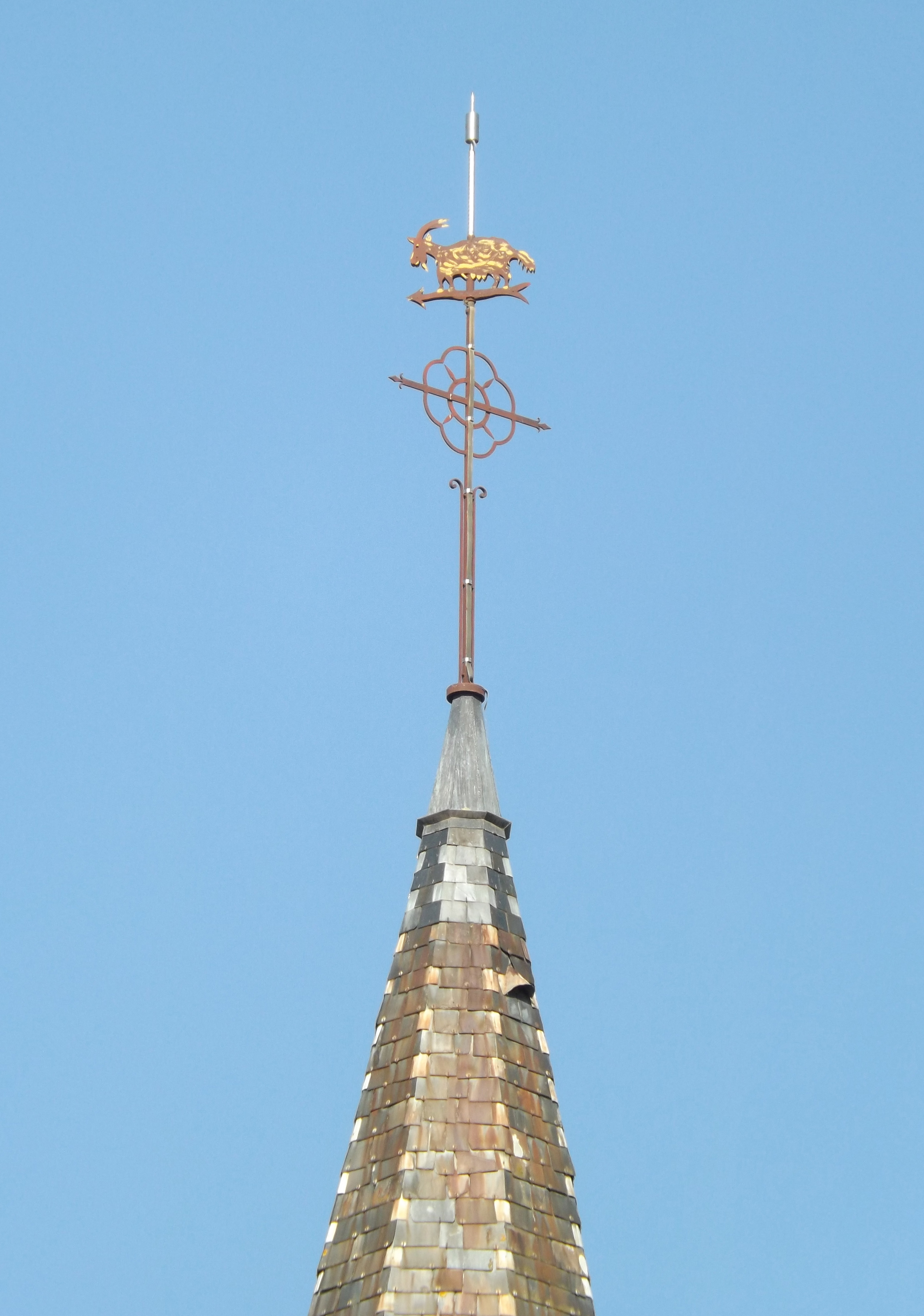 pointe du clocher de l'église St-Loup de Lacrabe, Landes, France